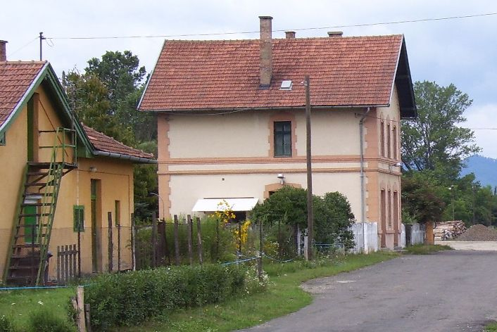 A rétsági vasútállomás 2006 augusztusában